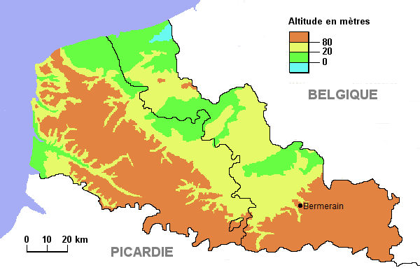 Relief des département du Nord et du Pas-de-Calais